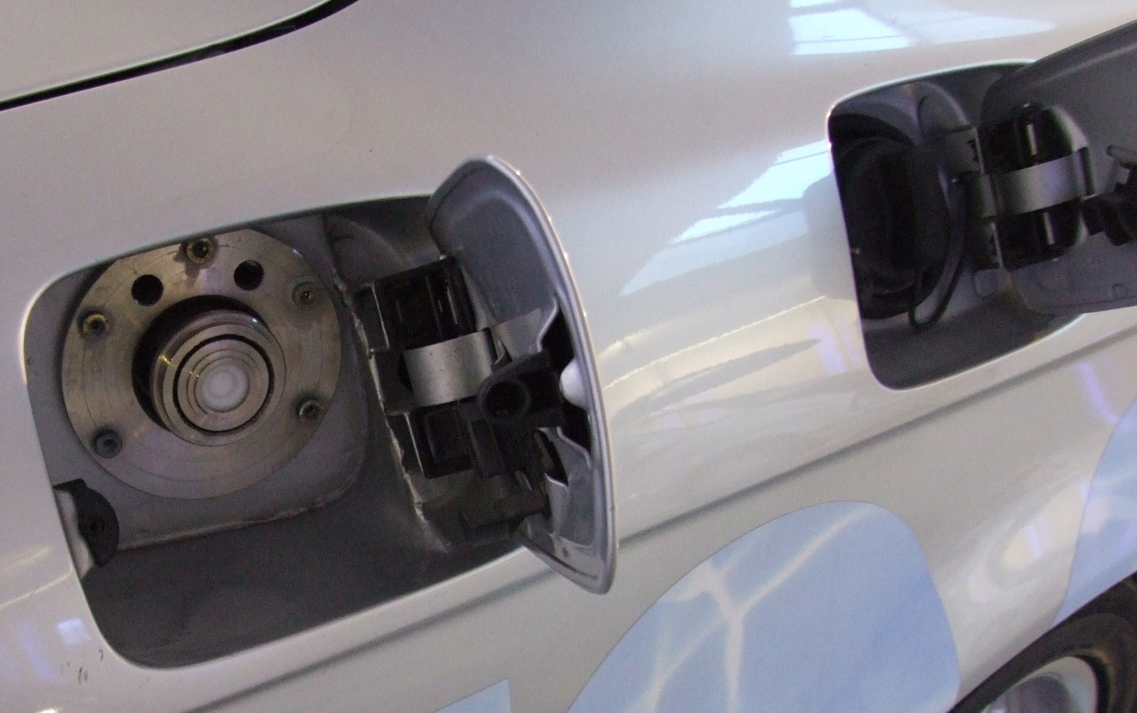 Wasserstoffeinfüllstutzen eines BMW, Museum Autovision, Altlußheim, Deutschland; left: filler neck for hydrogen of a BMW